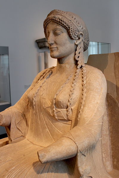 On peut remarquer les détails notamment des drapés